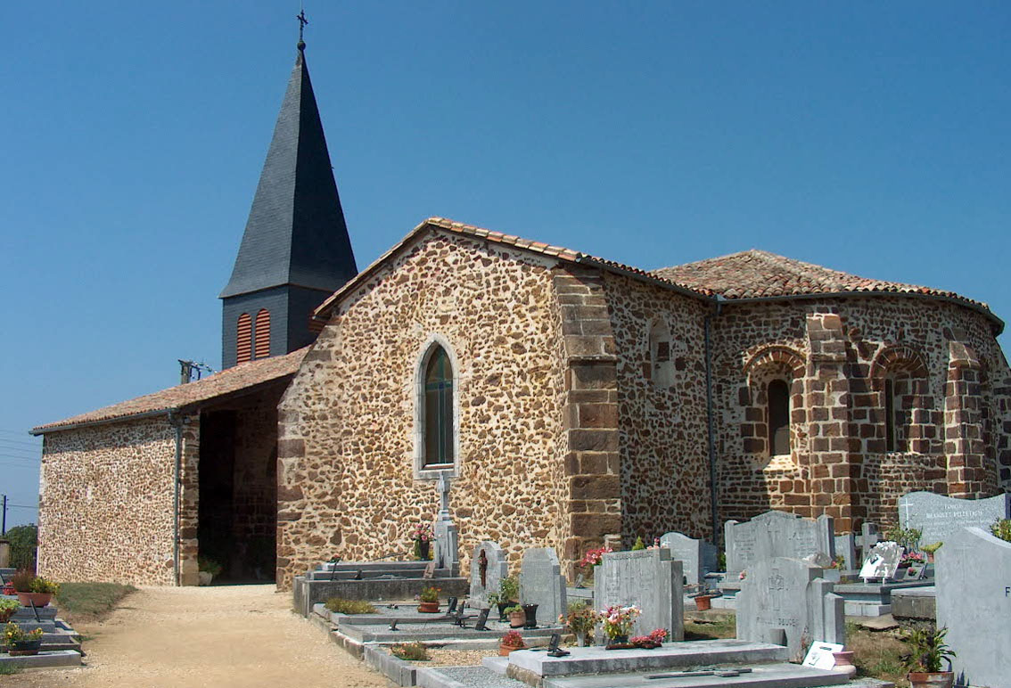 Eglise Castèth de Bonnut, dite Sainte-Marie, utilisation de l'alios.